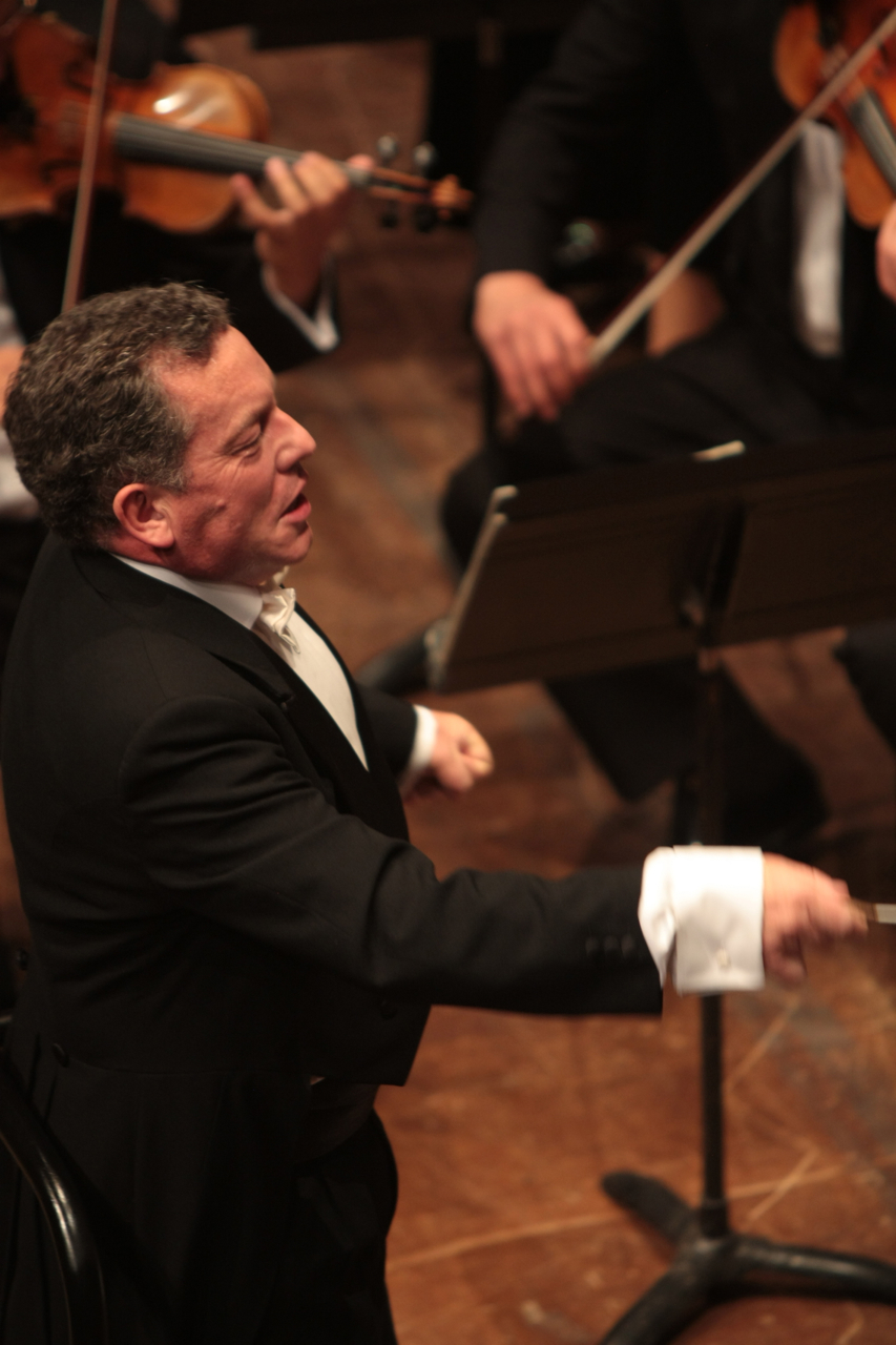 Laurence Dale dirigeant l'Orchestre du Festival d'Evian